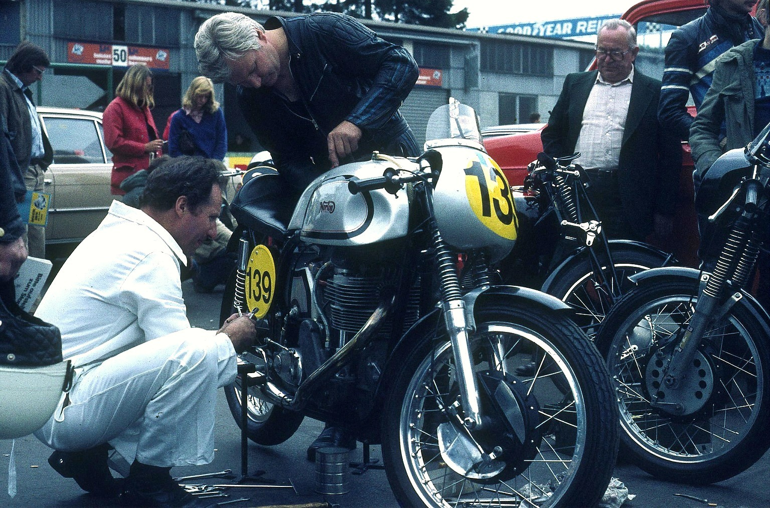 Norton Manx, Baujahr 1954, im Fahrerlager des Nürburgrings